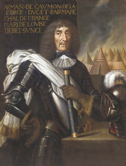 Armand Nompar de Caumont (né avant 1595 (1582 ?), décédé le 16 décembre 1672 à La Force, Dordogne), marquis puis duc de La Force, Pair de France, Maréchal de France (1652, Compiègne), Grand-Maître de la Garde-Robe du Roi. Fils de Jacques-Nompar de Caumont (1558-1652) et beau-père de Henri de La Tour, vicomte de Turenne, Maréchal de France.